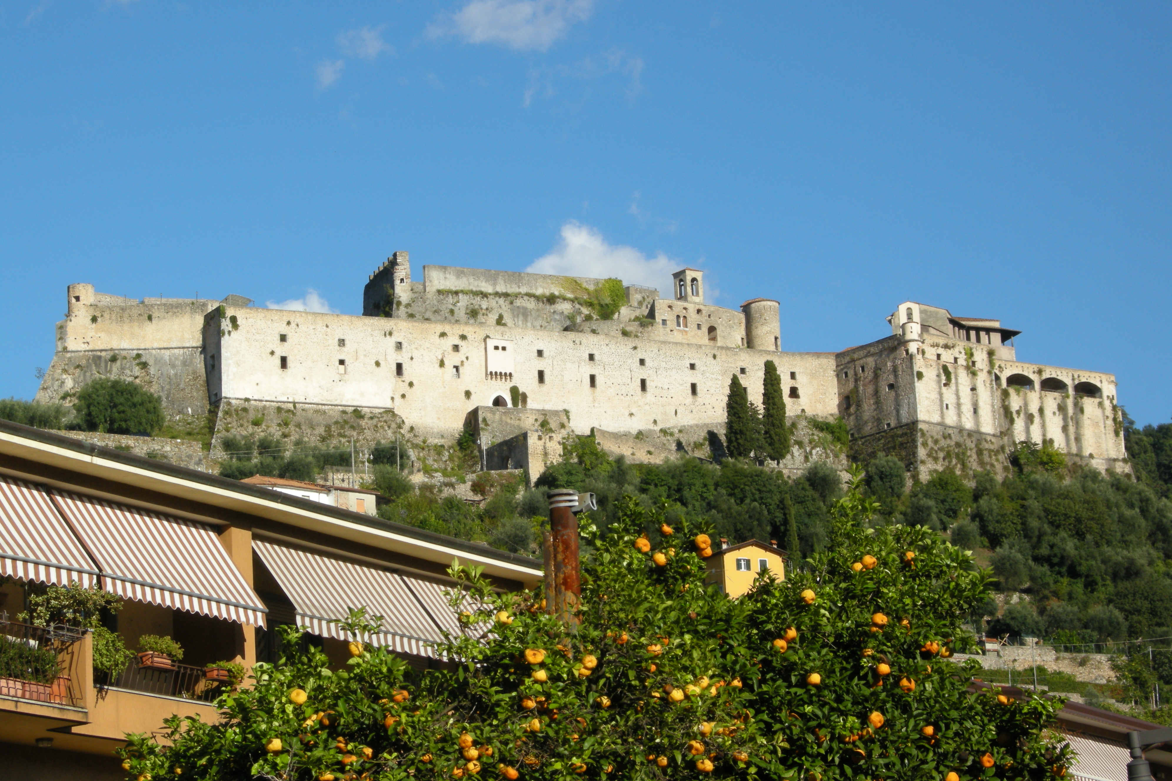 Castello Malaspina di Massa. Comune di Massa, Italia